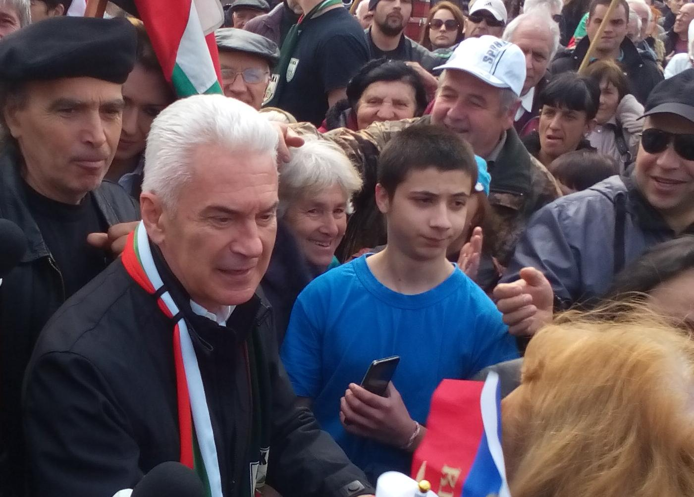 Волен Сидеров на митинг на партия Атака пред НДК в София на 3 март 2016 г.